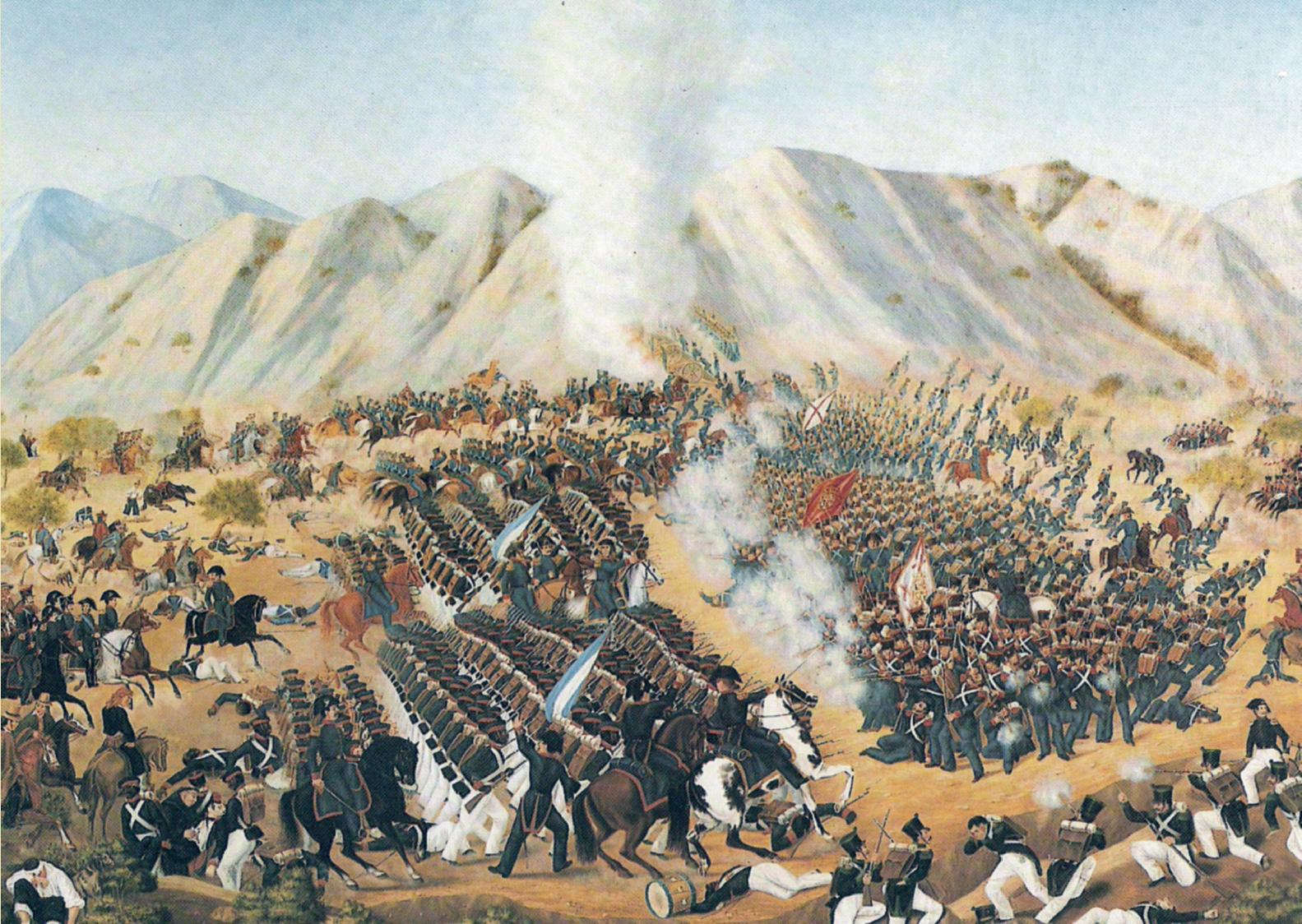 Batalla de Chacabuco por José Tomás Vandorse C.